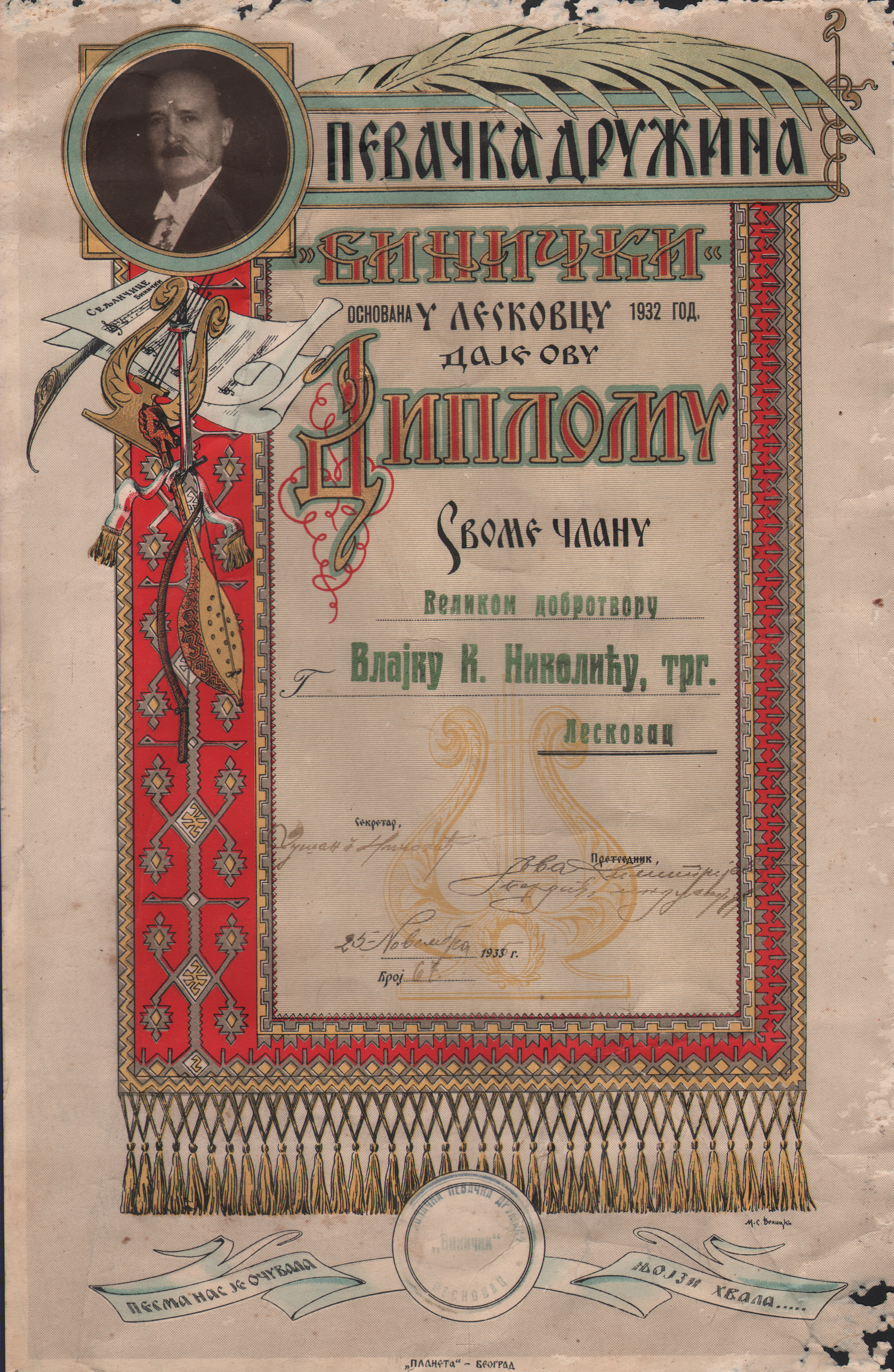 Srpski (latinica): Diploma Pevačke družine Binički br. 67 od 25. novembra 1935. godine, na ime Vlajka Nikolića, trgovca iz Leskovca.